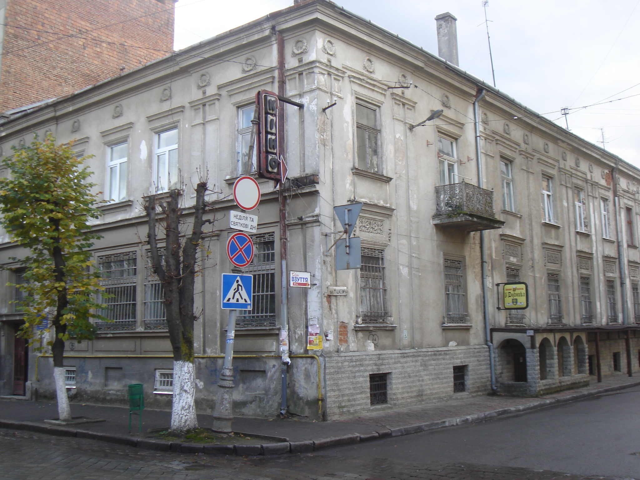 Житловий будинок (чиншова кам'яниця), вул. Т. Шевченка, 11